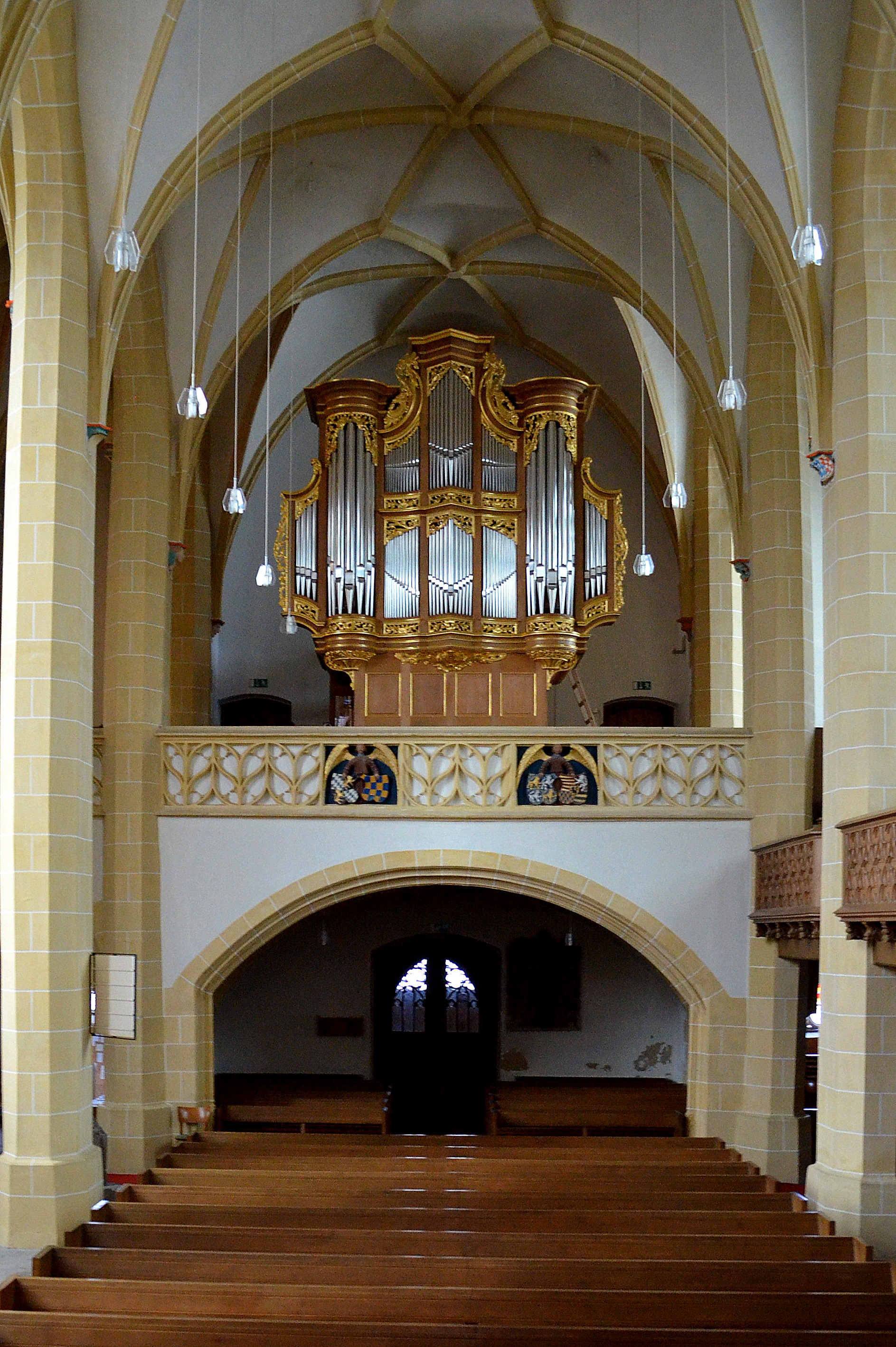 Simmern, Stefanuskerk, Stumm-orgel